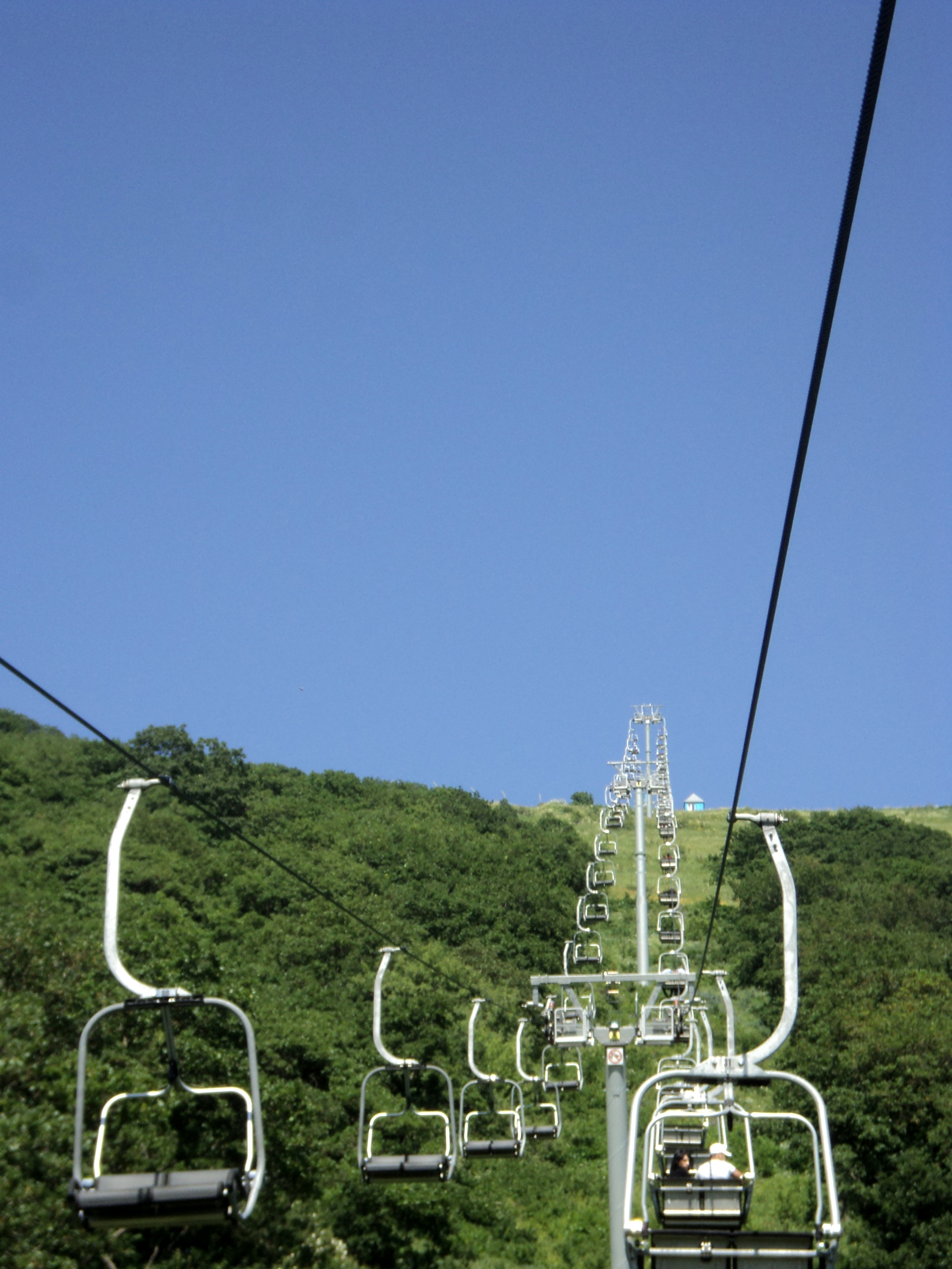 Ջերմուկի անտառային արգելավայր